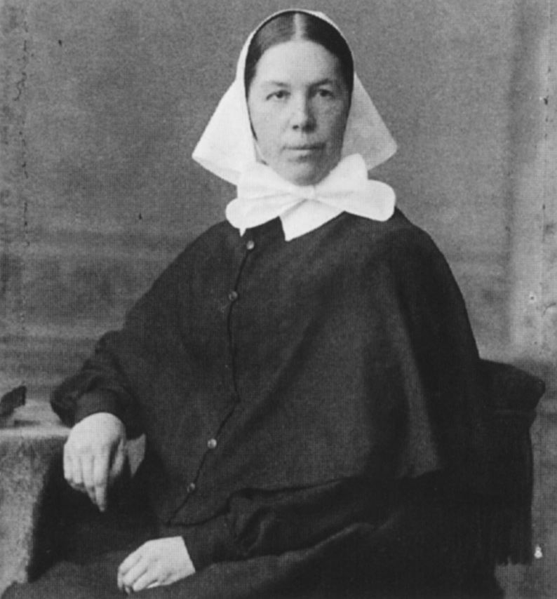 Sophie Pfizmaier, erste Oberin des Evangelischen Diakoniewerks Schwäbisch Hall